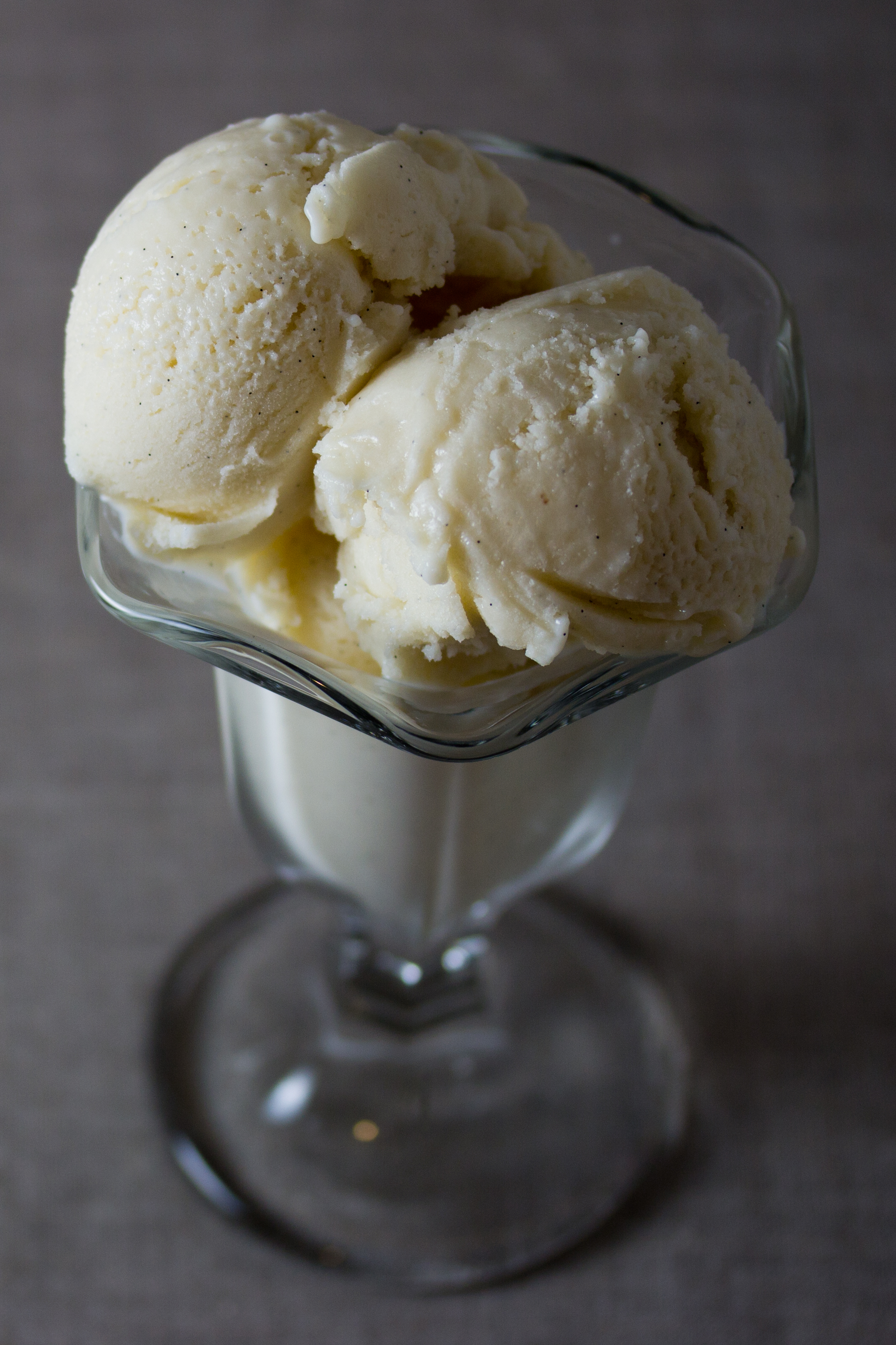 Vegan Vanilla Ice Cream